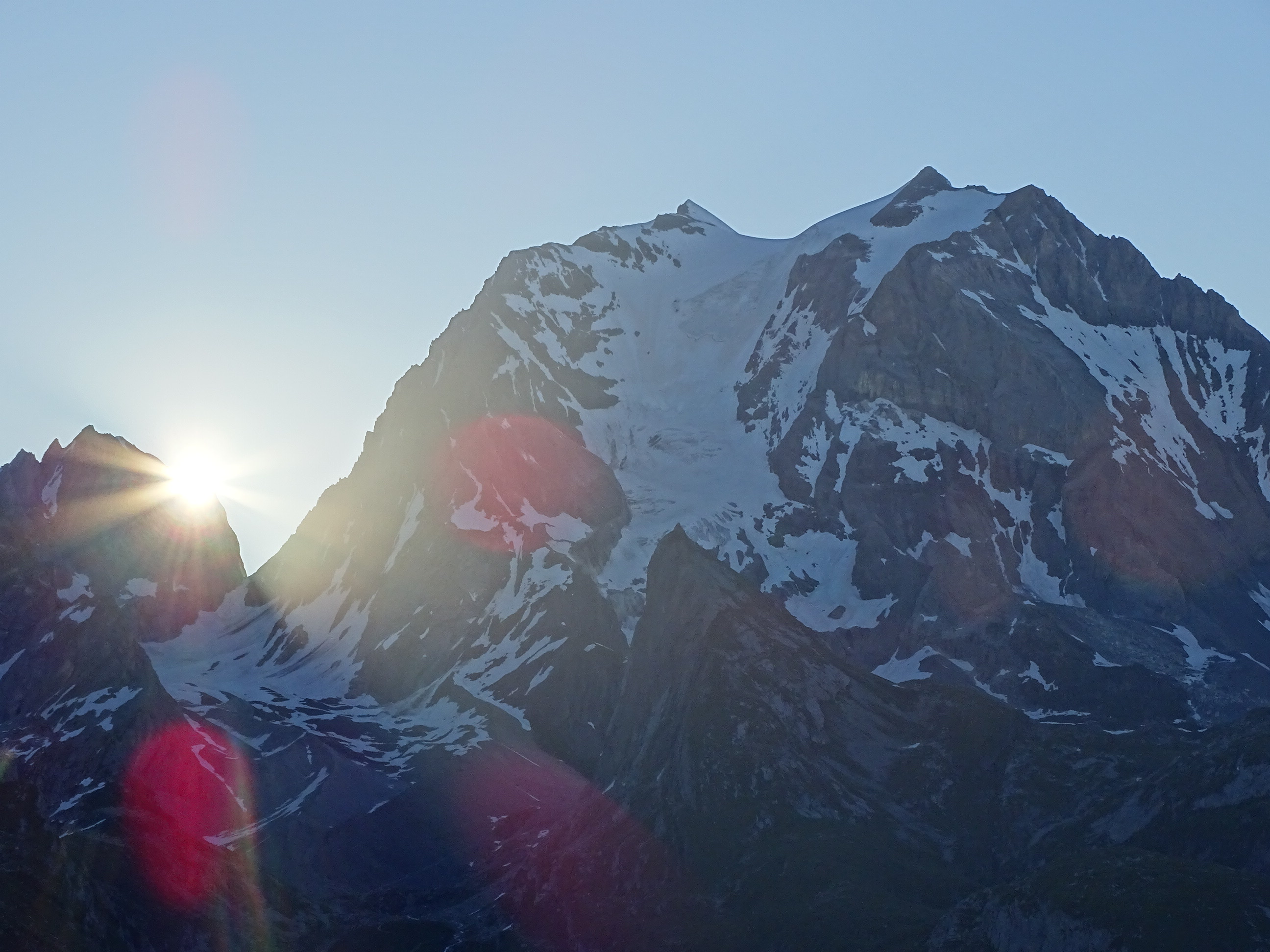 Grande Casse vue du col de Napremont